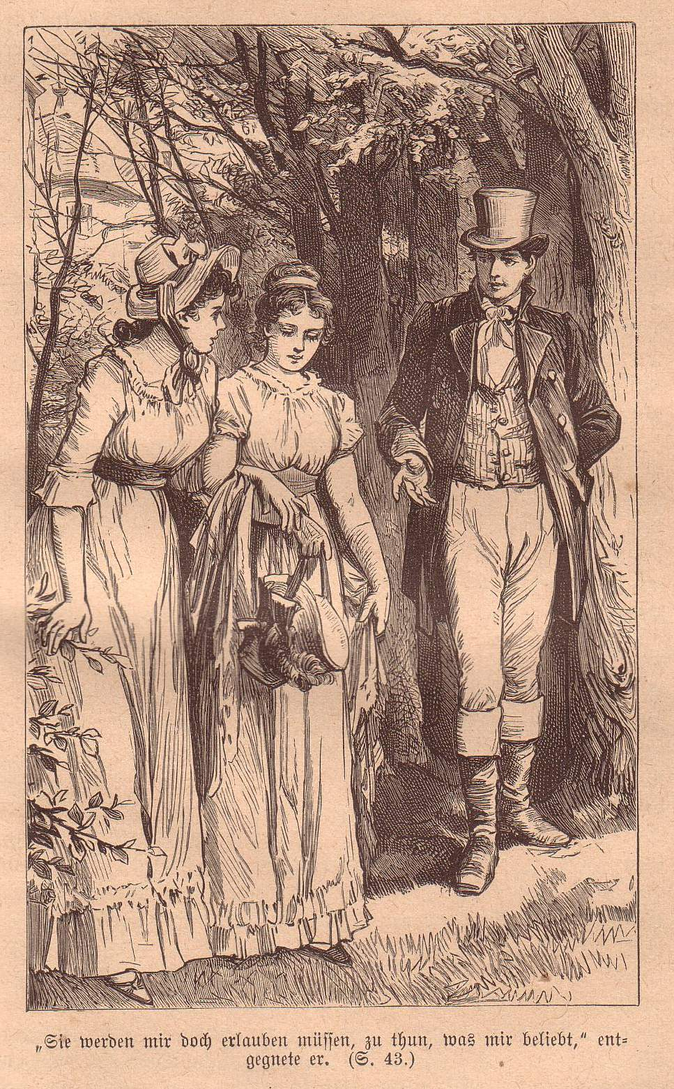 Illustr bei Marie Nathusius: Die alte Jungfer